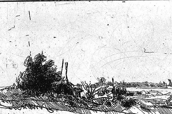 Ätznadelradierung von Wolfram Gothe; 1989 Urheber: Wolfram Gothe